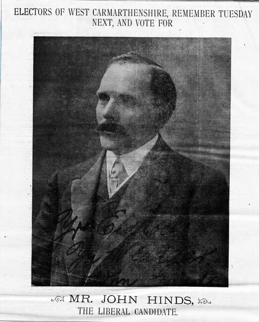 Hysbyseb papur newydd i annog pobl i bleidleisio i John Hinds yn etholiad gyffredinol Rhagfyr 1910, o gasgliad papurau newydd LLGC